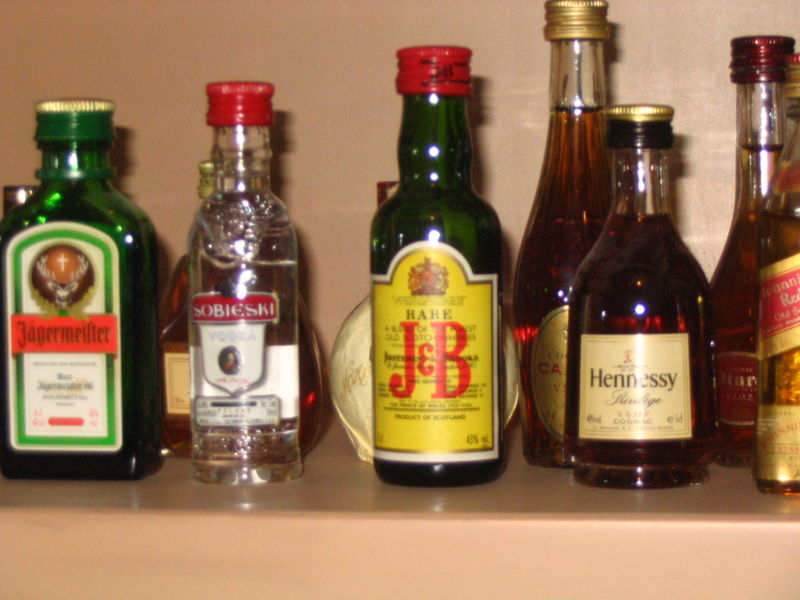 مجموعة مشروبات كحولية.